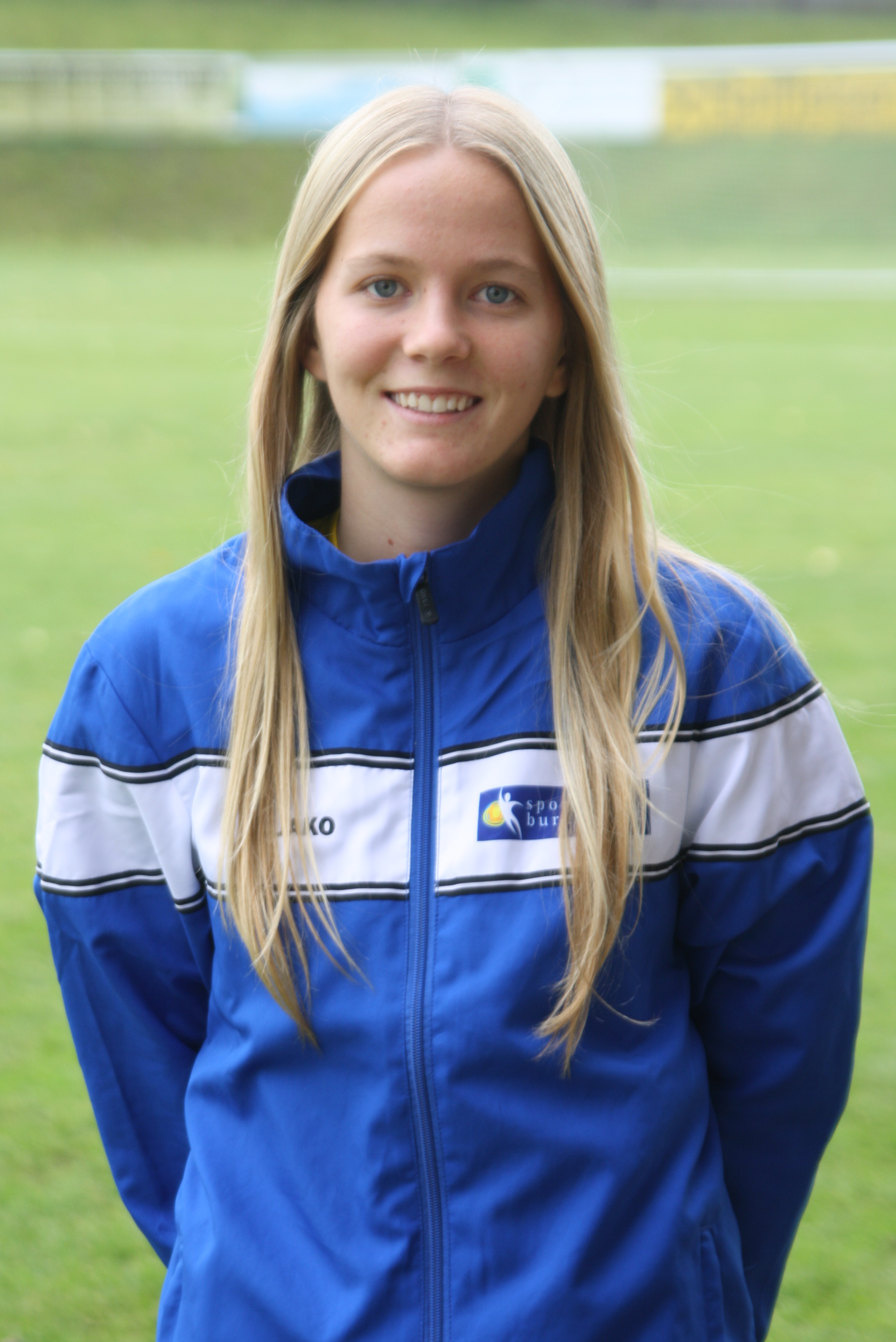 Jennifer Pöltl